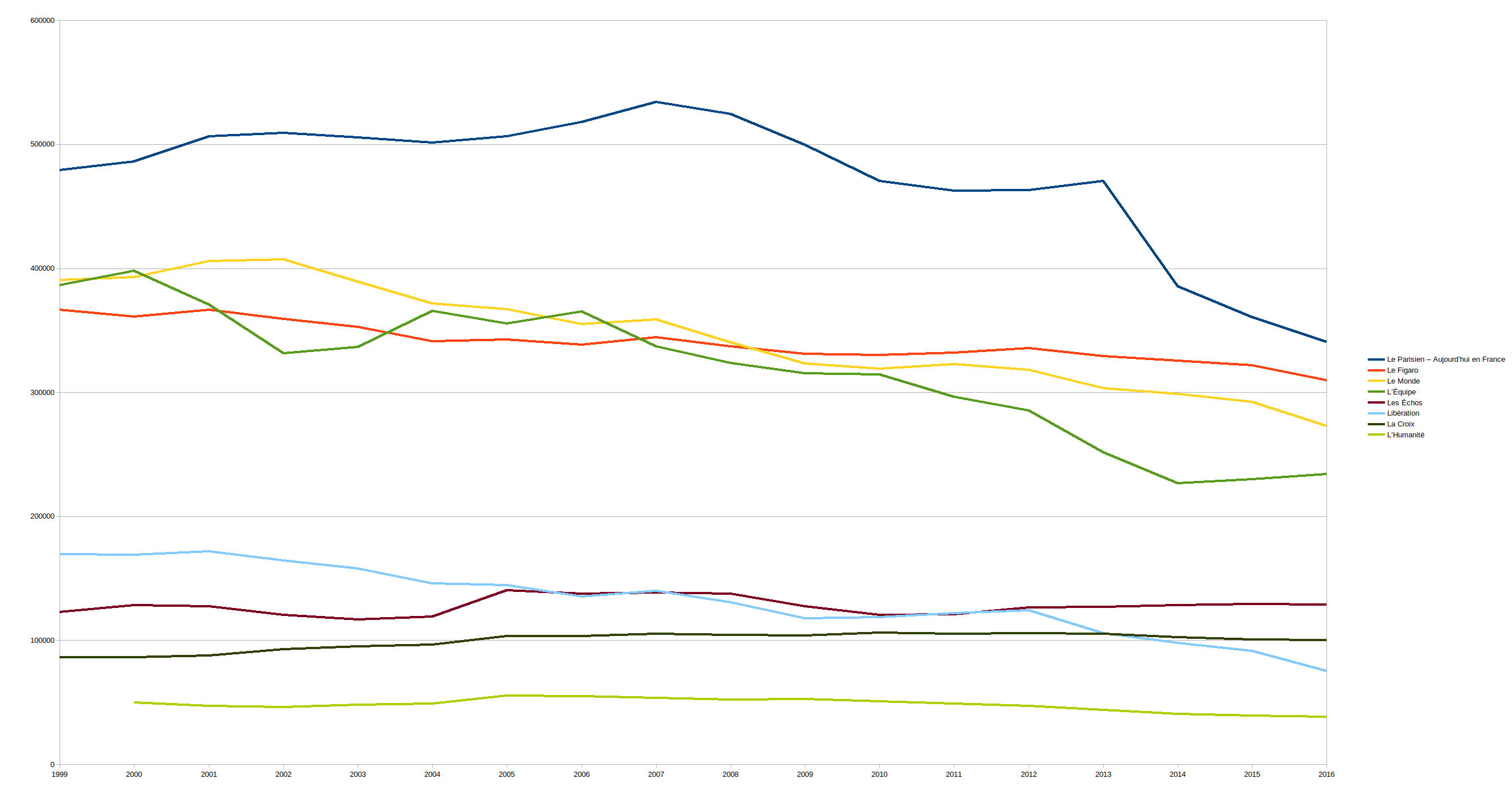 Évolution des ventes des 8 journaux de la Presse Quotidienne nationale (PQN) en France depuis 1999